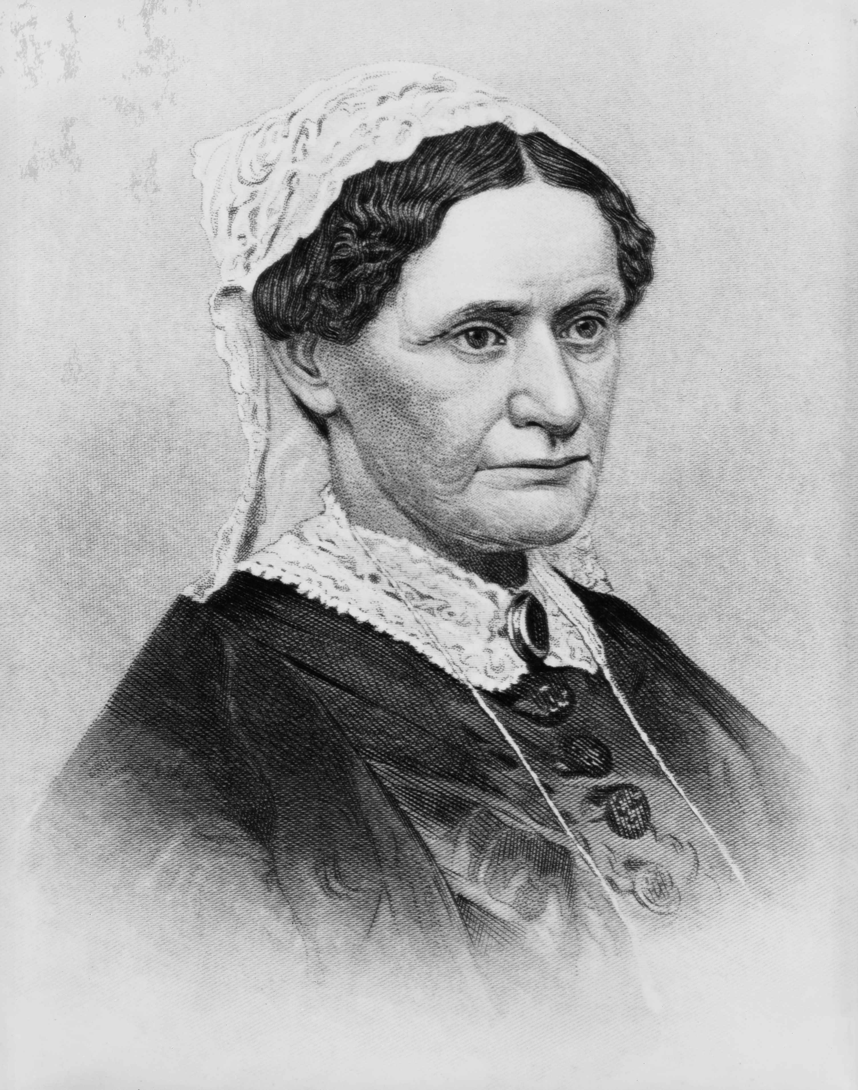 ElizaJohnson